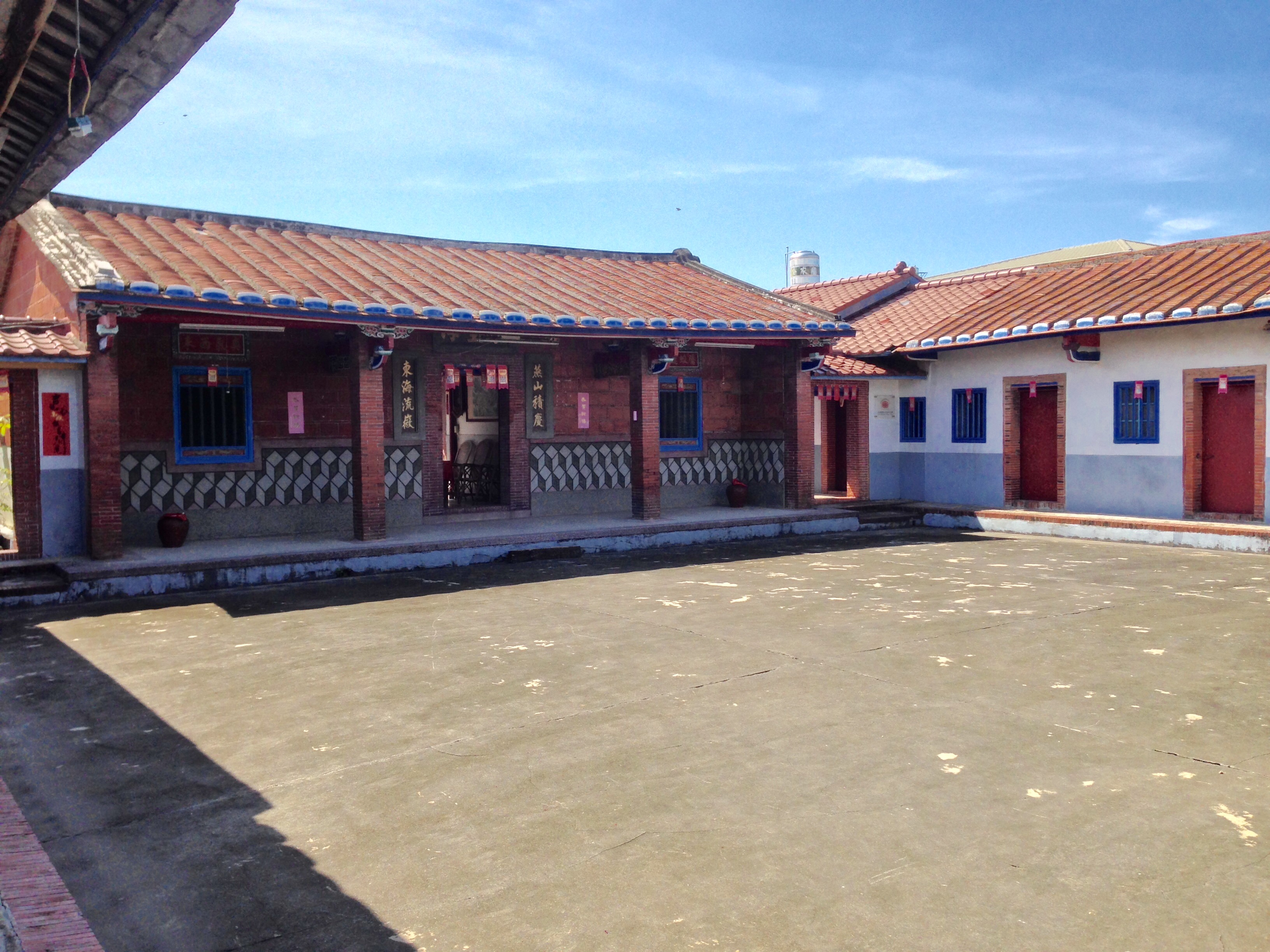 美和村徐家夥房（徐傍興博士祖屋）